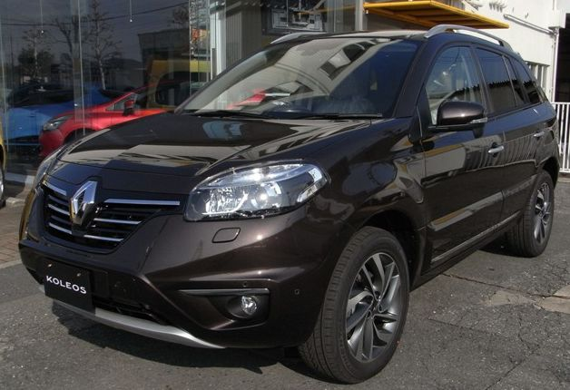 ルノー・コレオス